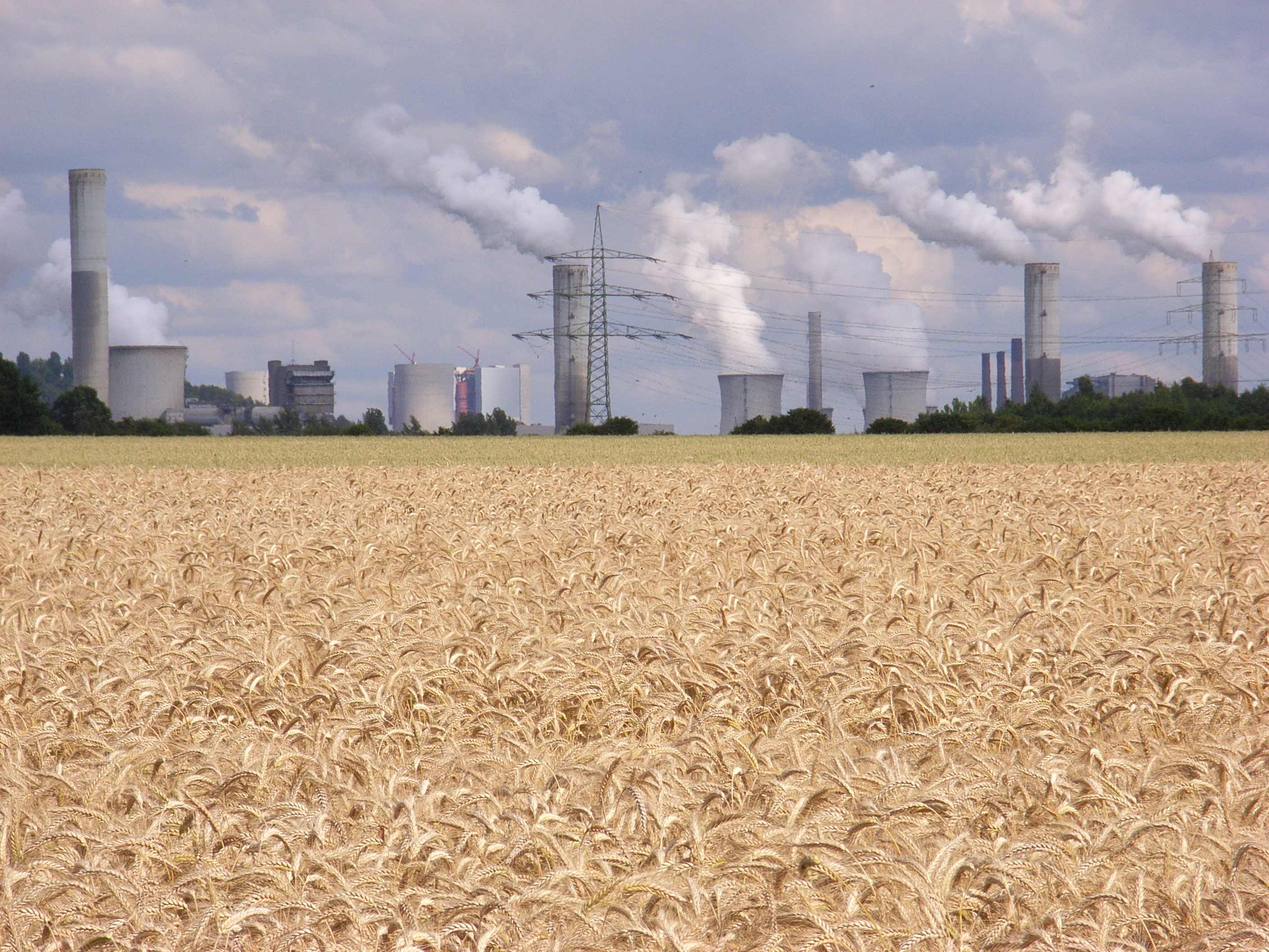 RWE Kraftwerk Frimmersorf, Gustorfer Höhe, NRW